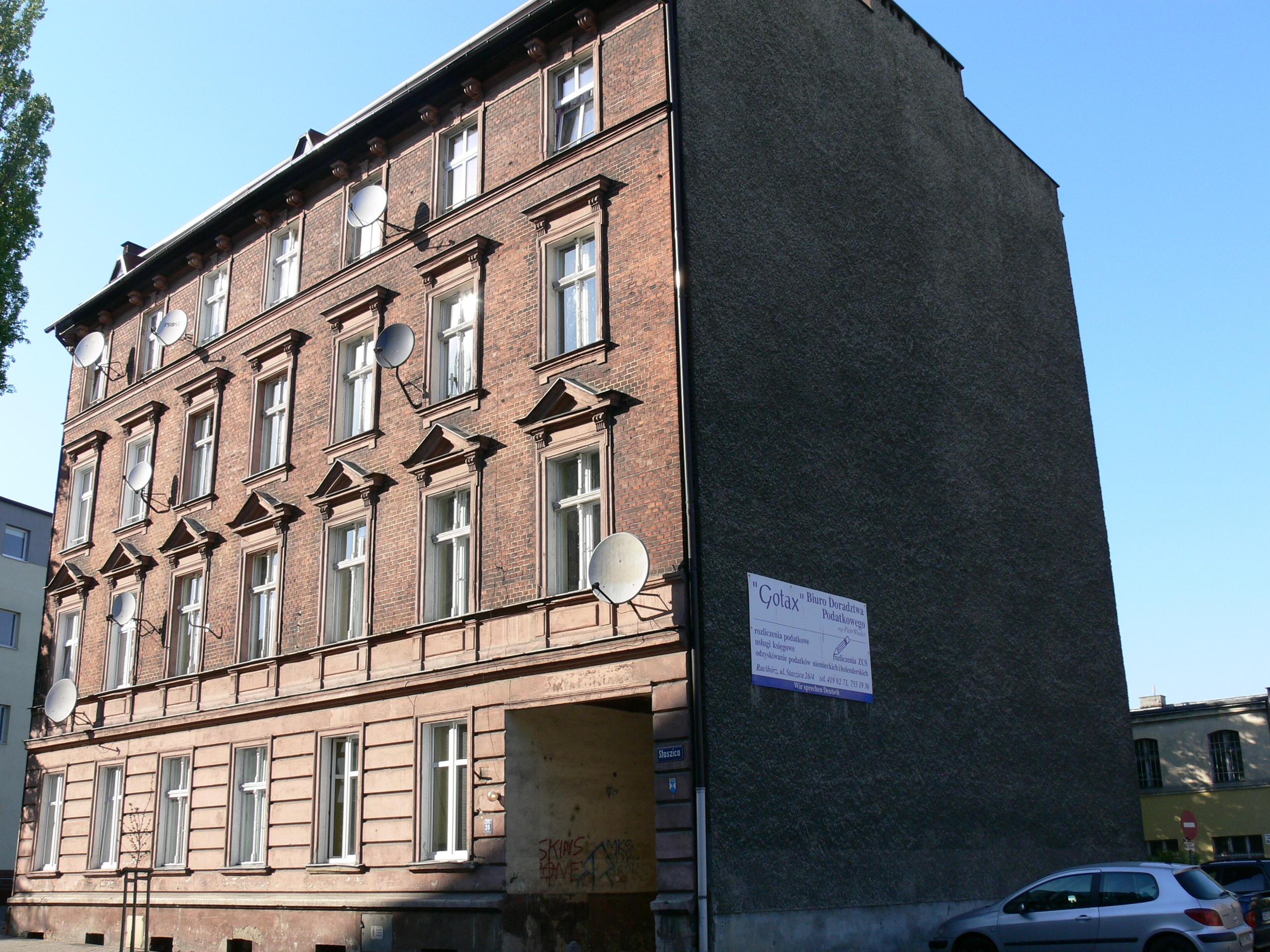 ul. Staszica nr 26